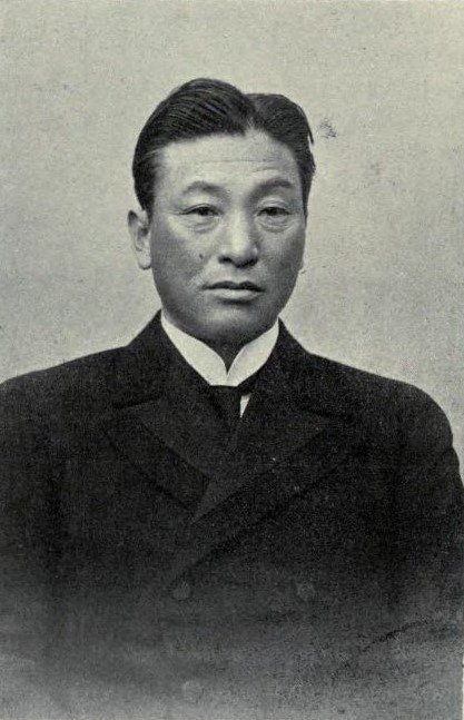 福島浪蔵。株式仲買人